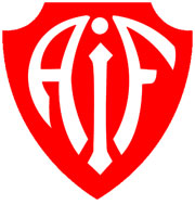 Logo for Albertslund Idrætsforening (AIF)